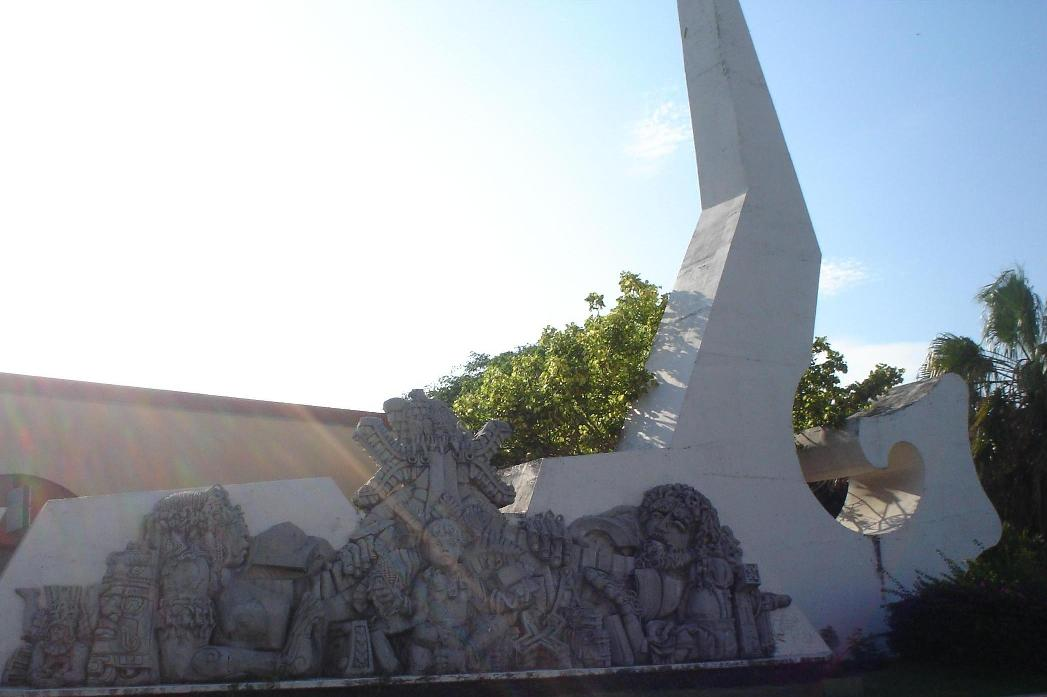 Escultura del museo de la cultura maya, Chetumal QR